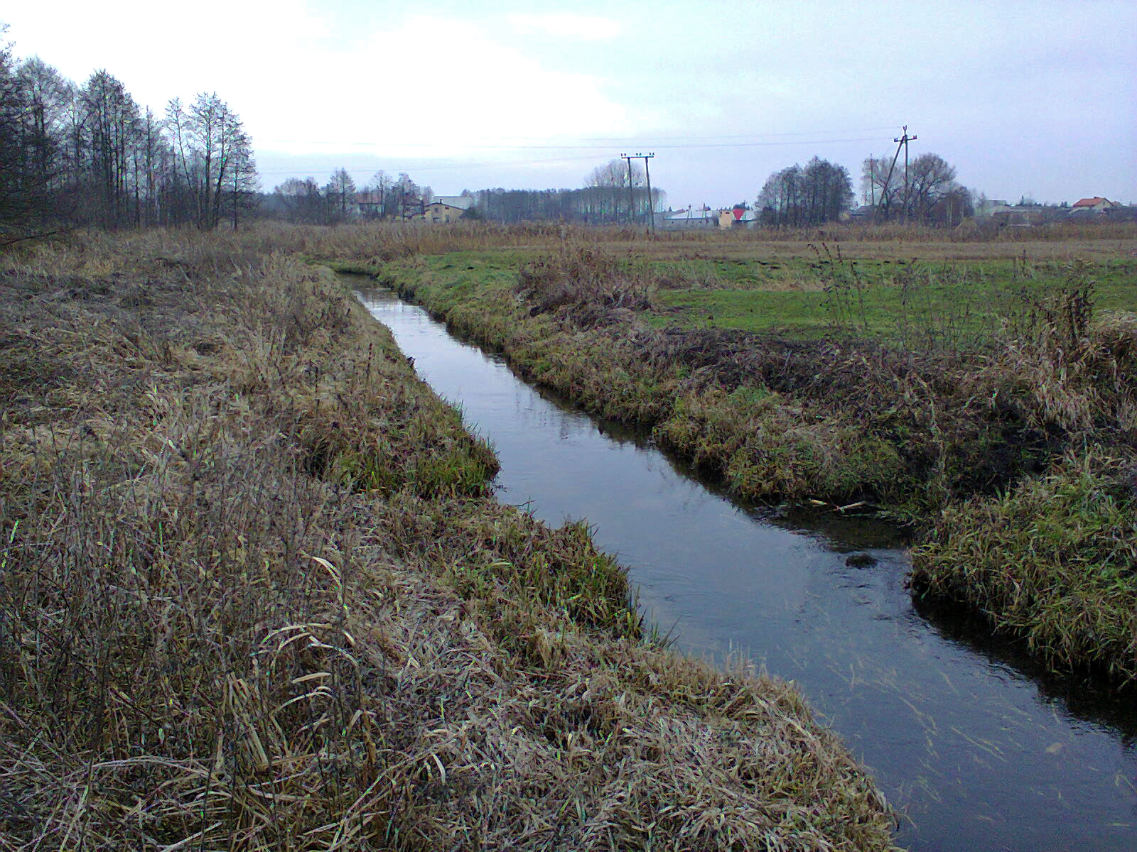 Łabnianka w Kolnie